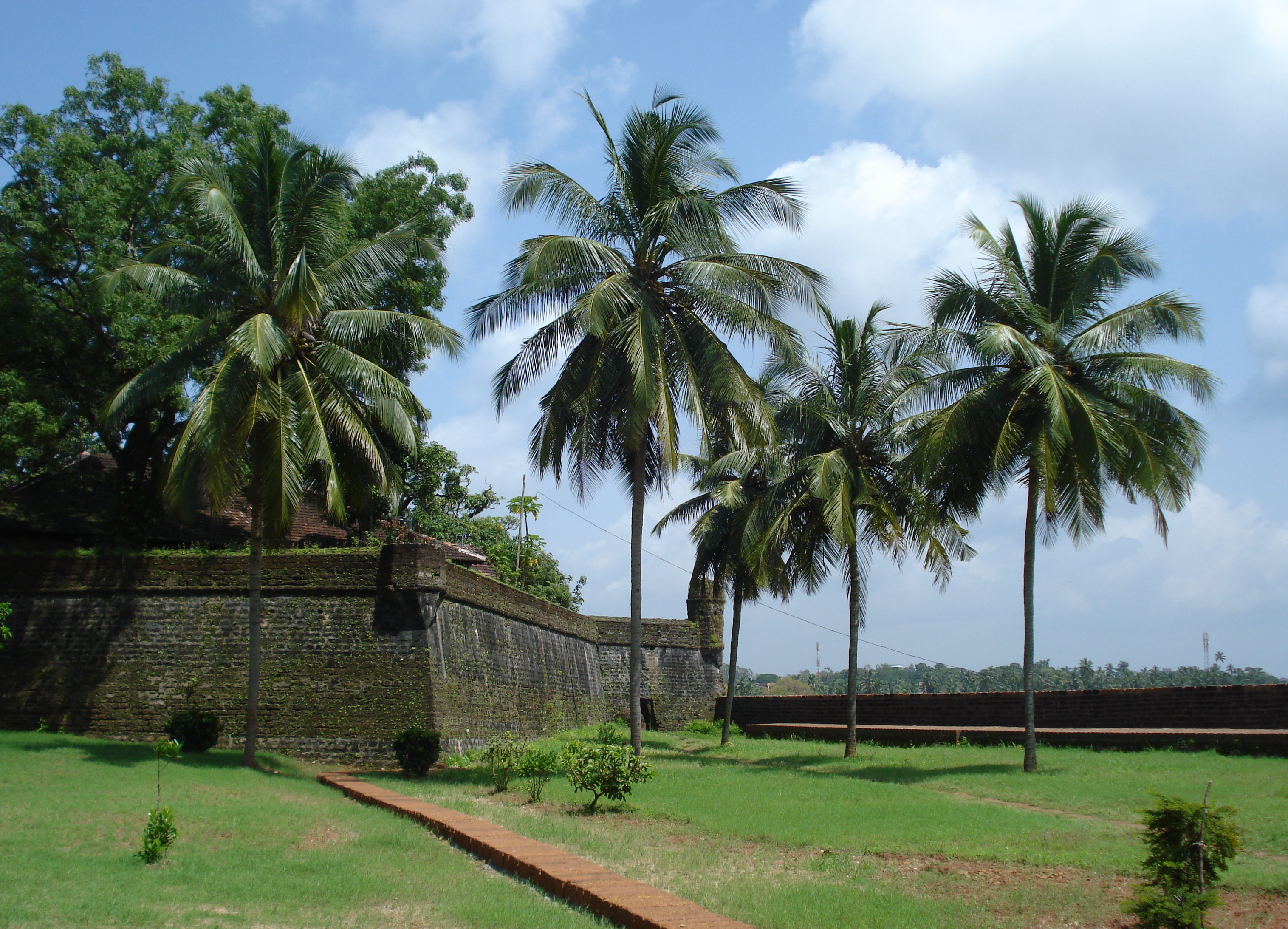 Kannur Fort